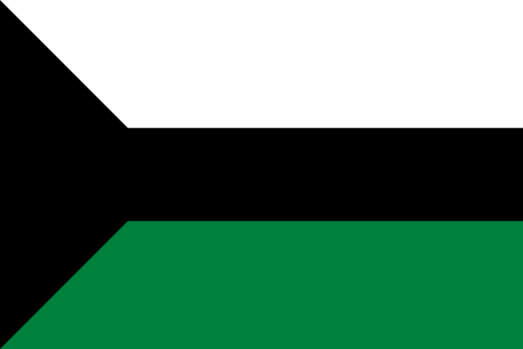 Bandera de La Joya de Los Sachas